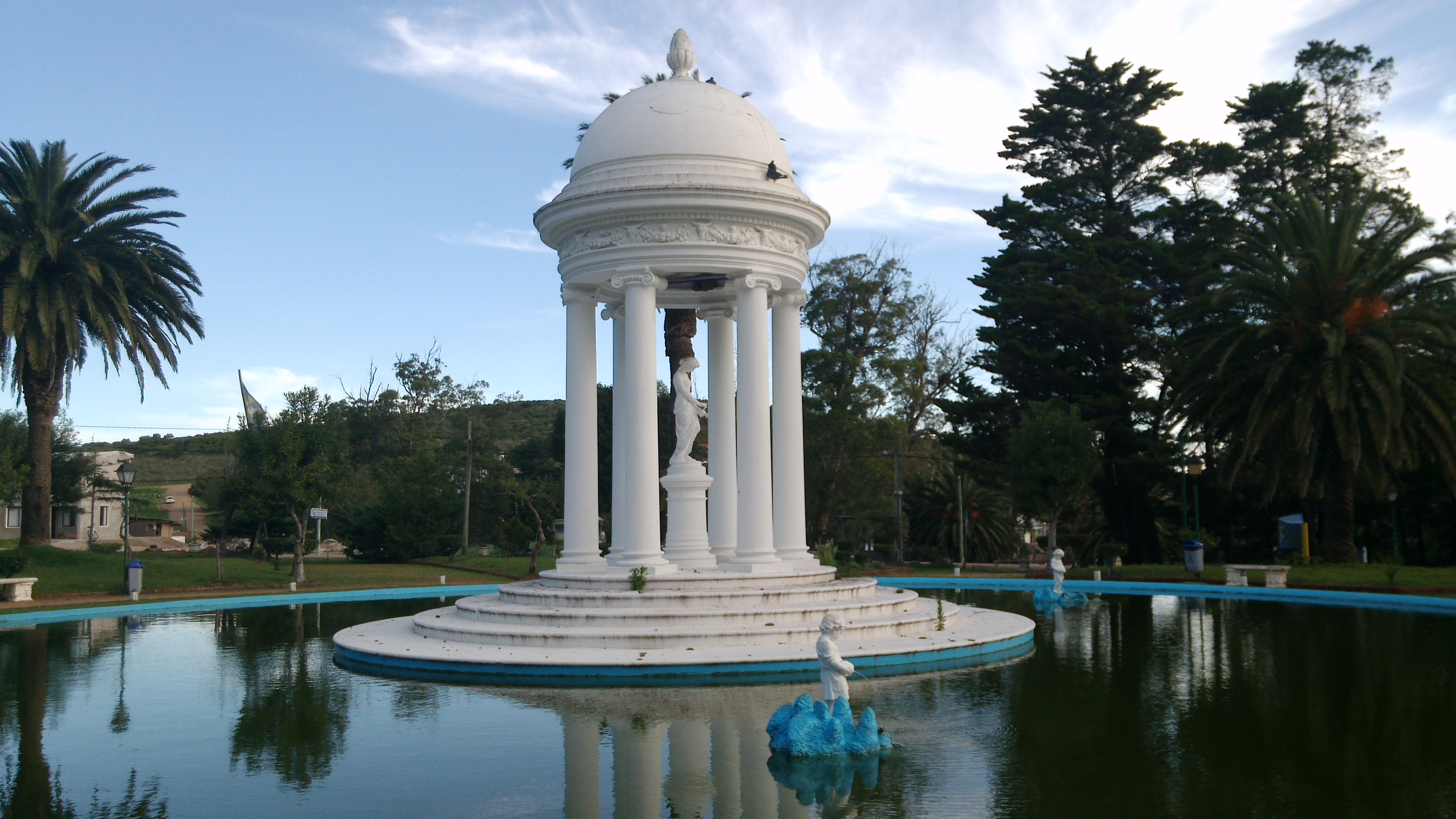 Fuente de Venus, Piriápolis, Maldonado, Uruguay.